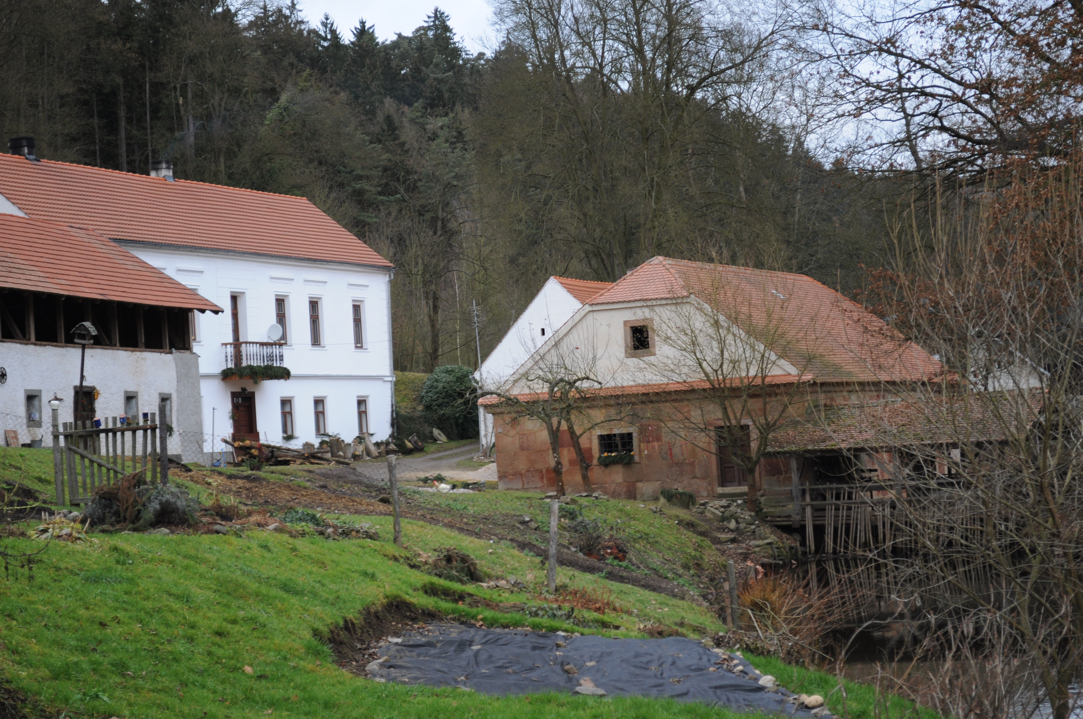 Mlýn U Nováků, Bohy 18, pod hradem, Bohy.